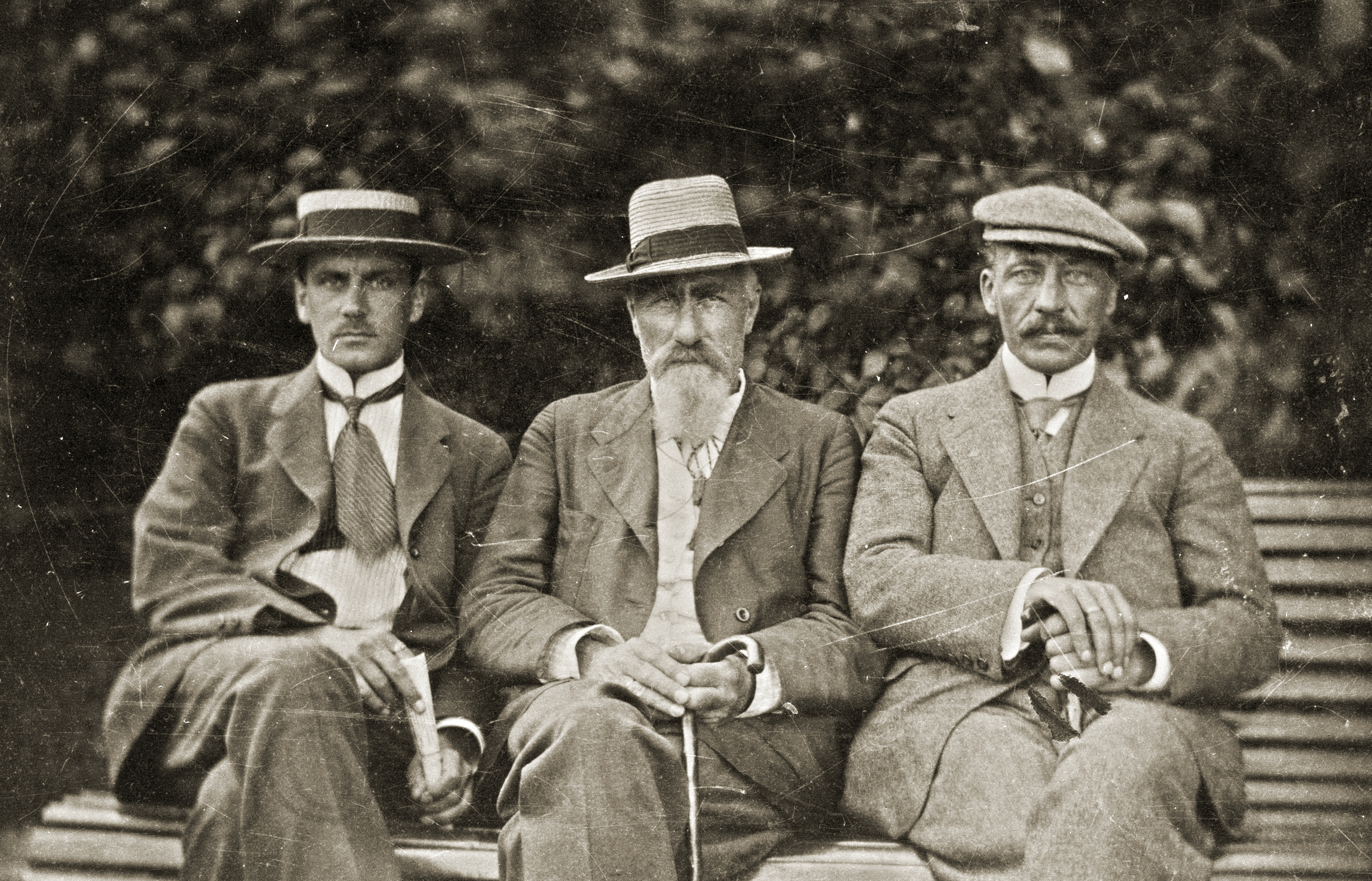 Arkeologit Mikko Tallgren, Hjalmar Appelgren-Kivalo, Juhani Rinne 1900-luvun alussa